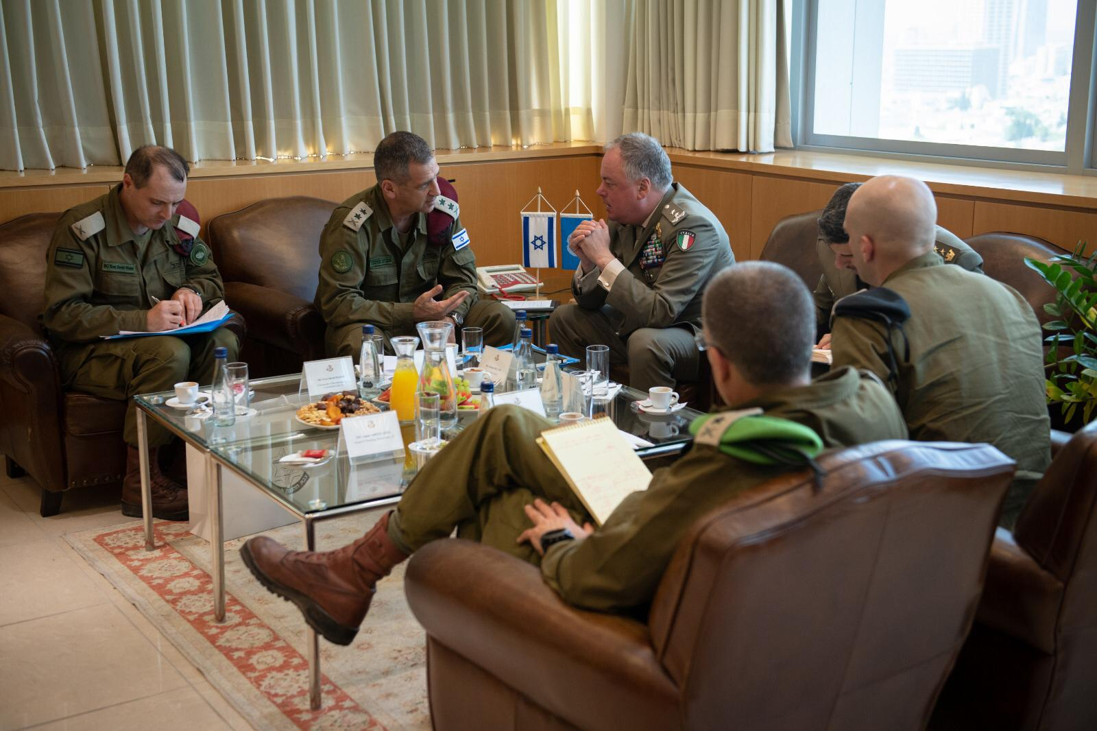 רא"ל אביב כוכבי בפגישה עם מפקד יוניפי"ל, גנרל סטפנו דל קול, בפעם הראשונה מאז תחילת כהונתו.